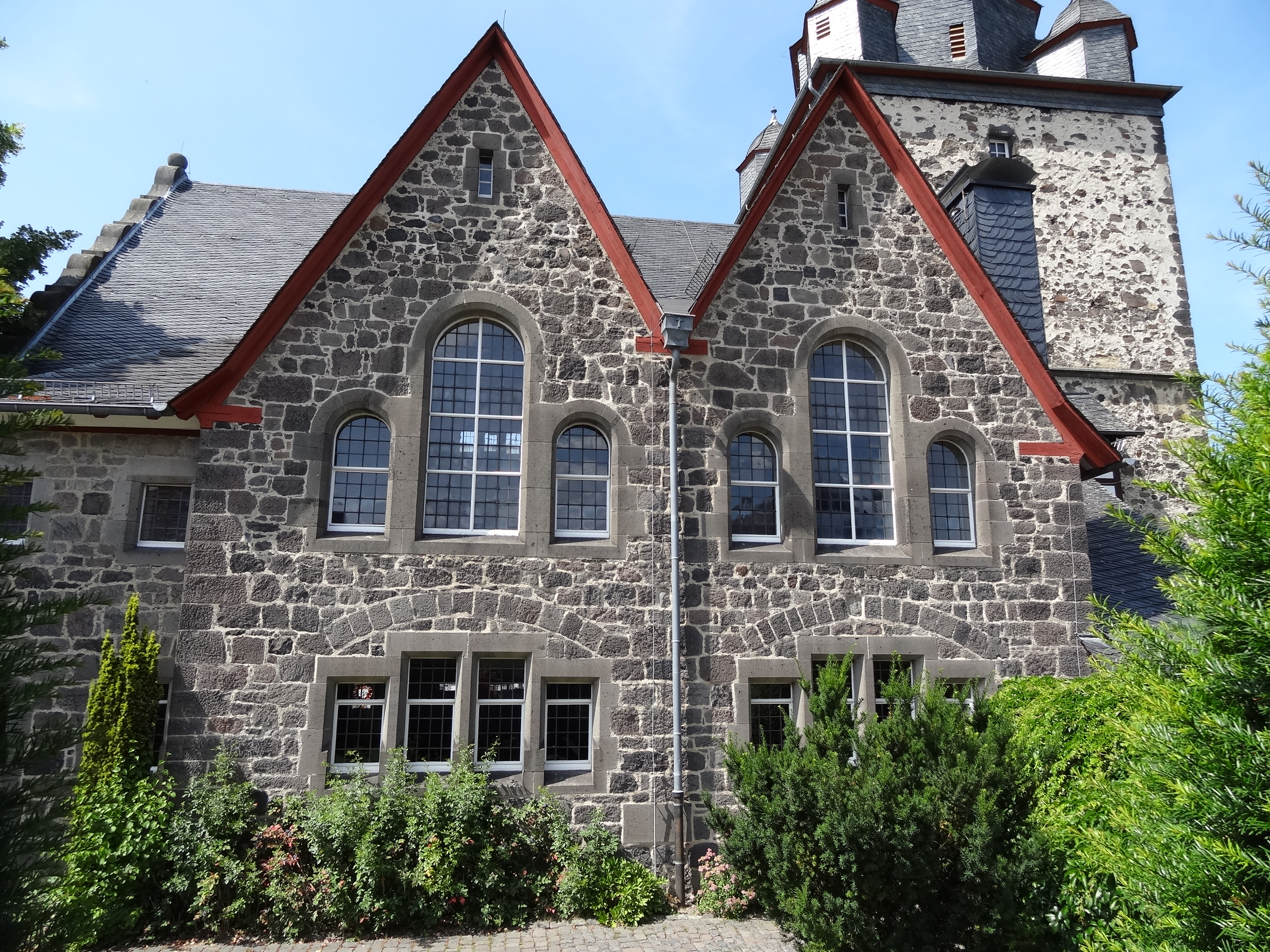 Evangelische Kirche Leihgestern